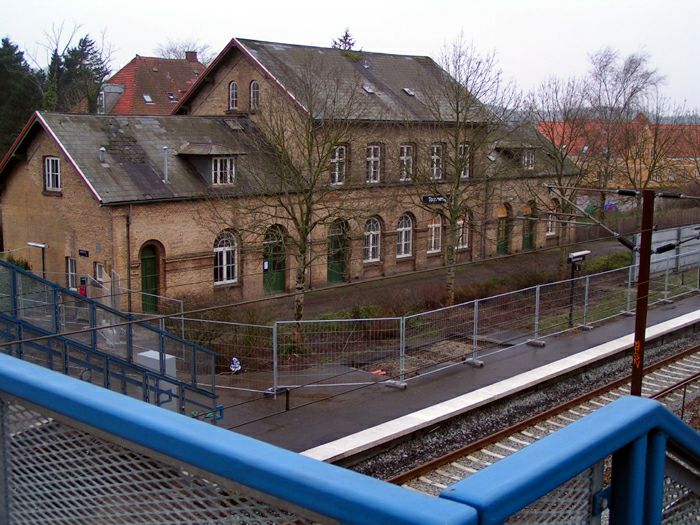 Tommerup Station